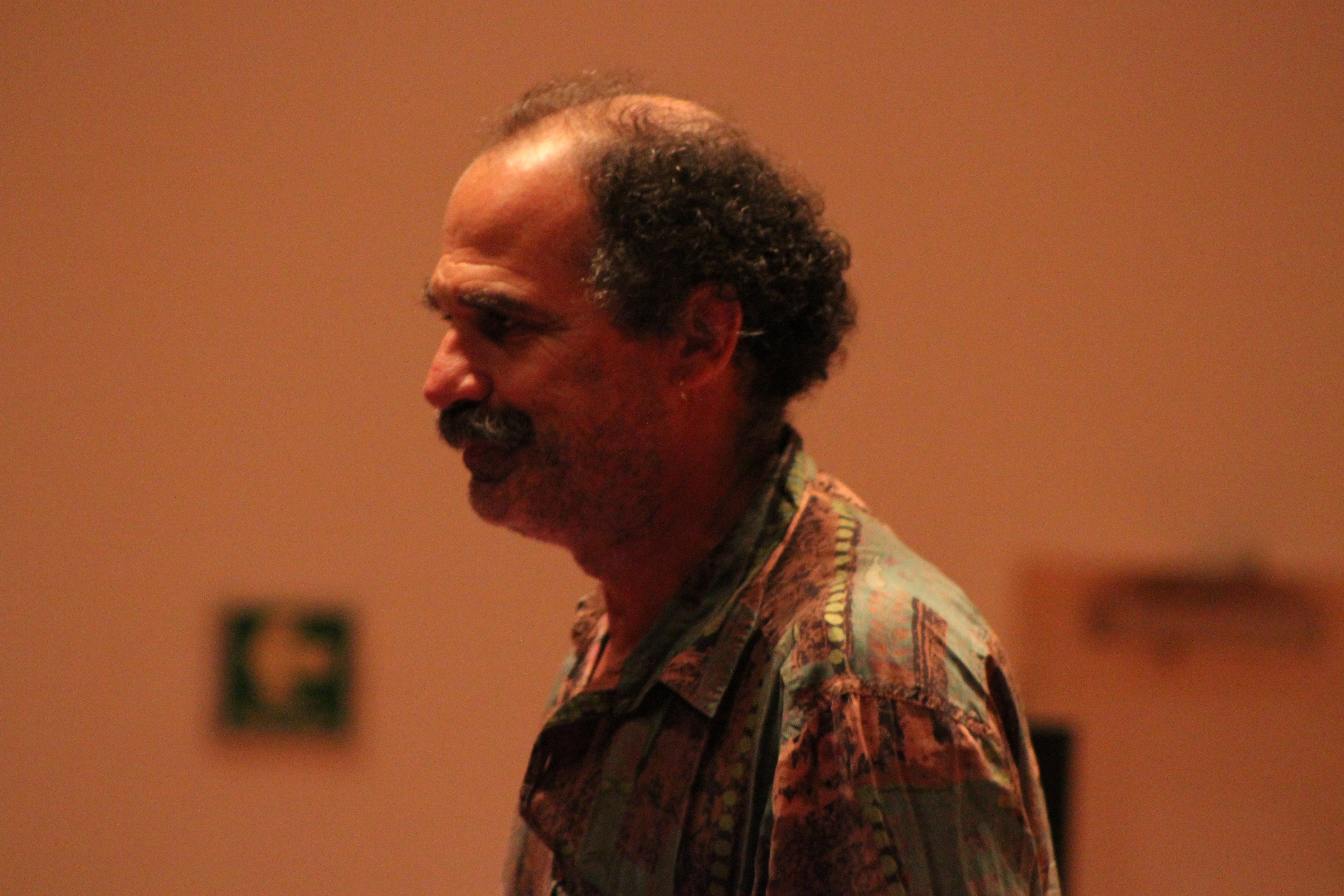 Ciudad de México, 2011